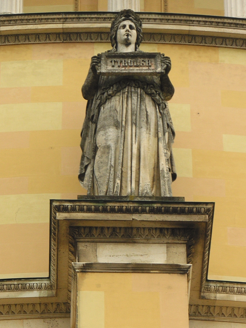 Diese Statue an der Aussenseite der Befreiungshalle in Kelheim steht für den Volksstamm der Tyroler (Schreibweise beachten), Höhe der Statue 580 cm. Sie ist eine von 18 Statuen, die nach Modellen des Bildhauers Johann Halbig geschaffen wurden.